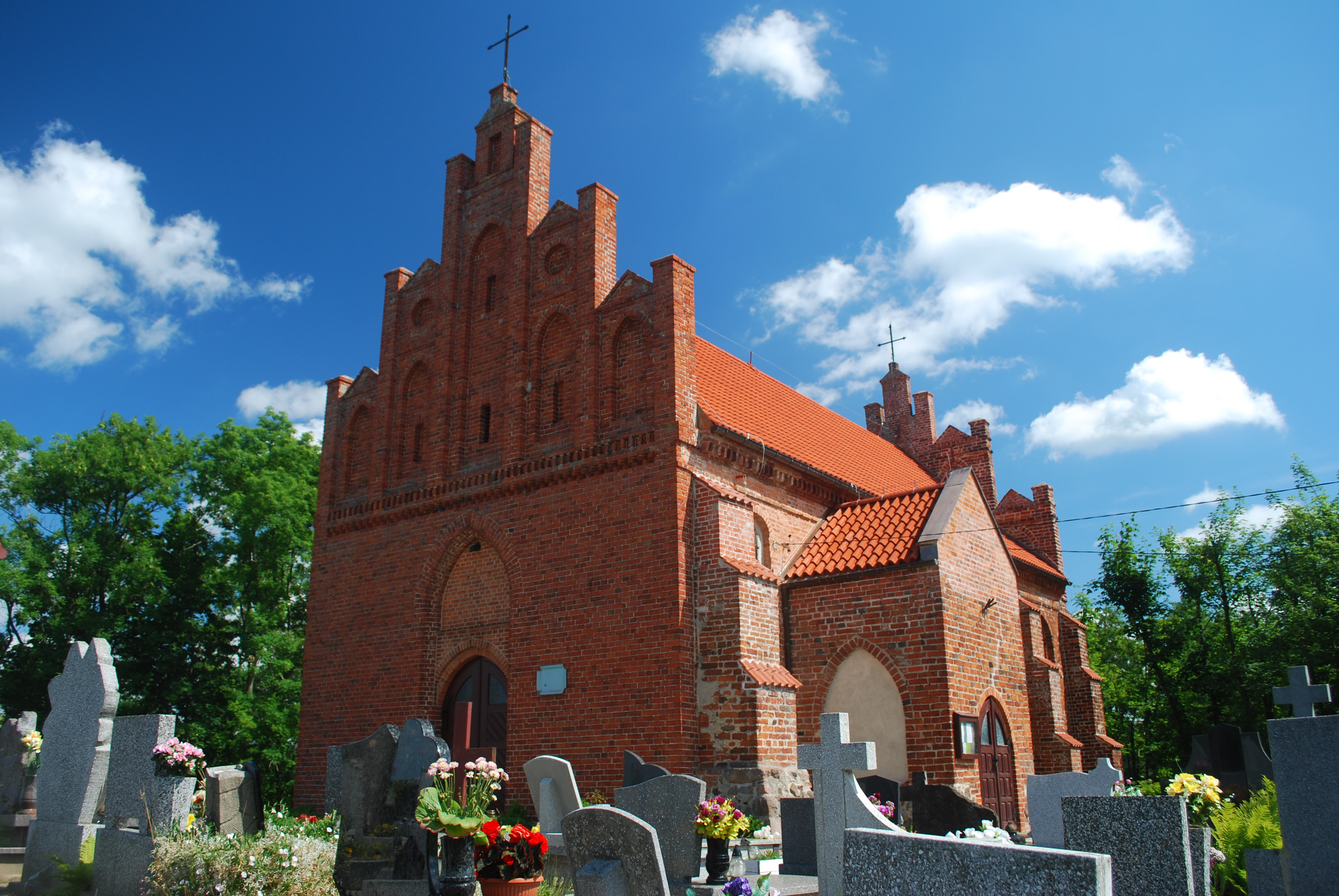 Kościół parafialny p.w. św. Wawrzyńca w Jabłowie (zabytek nr rejestr. 236)